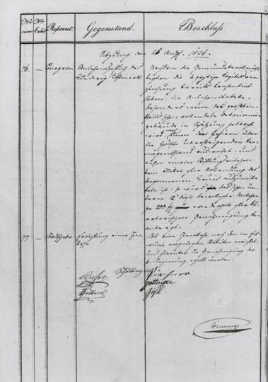 Ratsbeschluss zur Gründung der Vereinigten Sparkassen